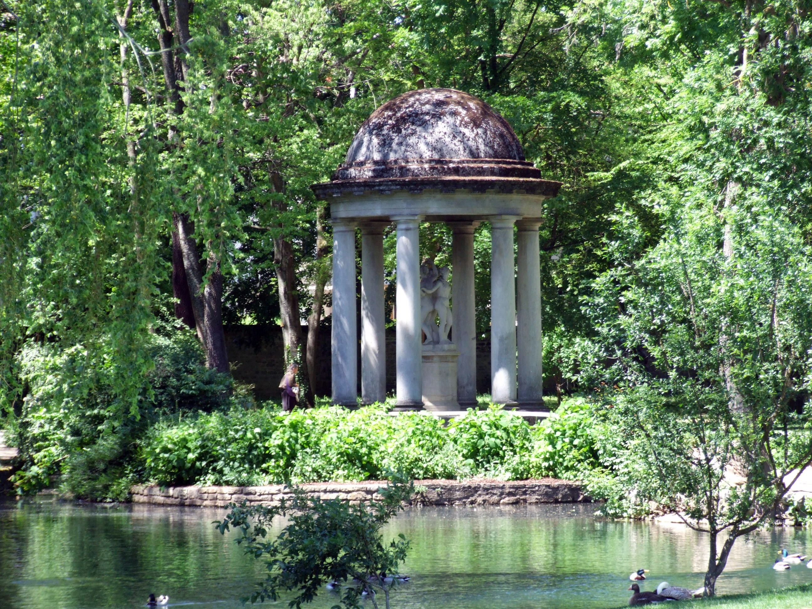 Jardin de l'Arquebuse, Dijon, Bourgogne, FRANCE